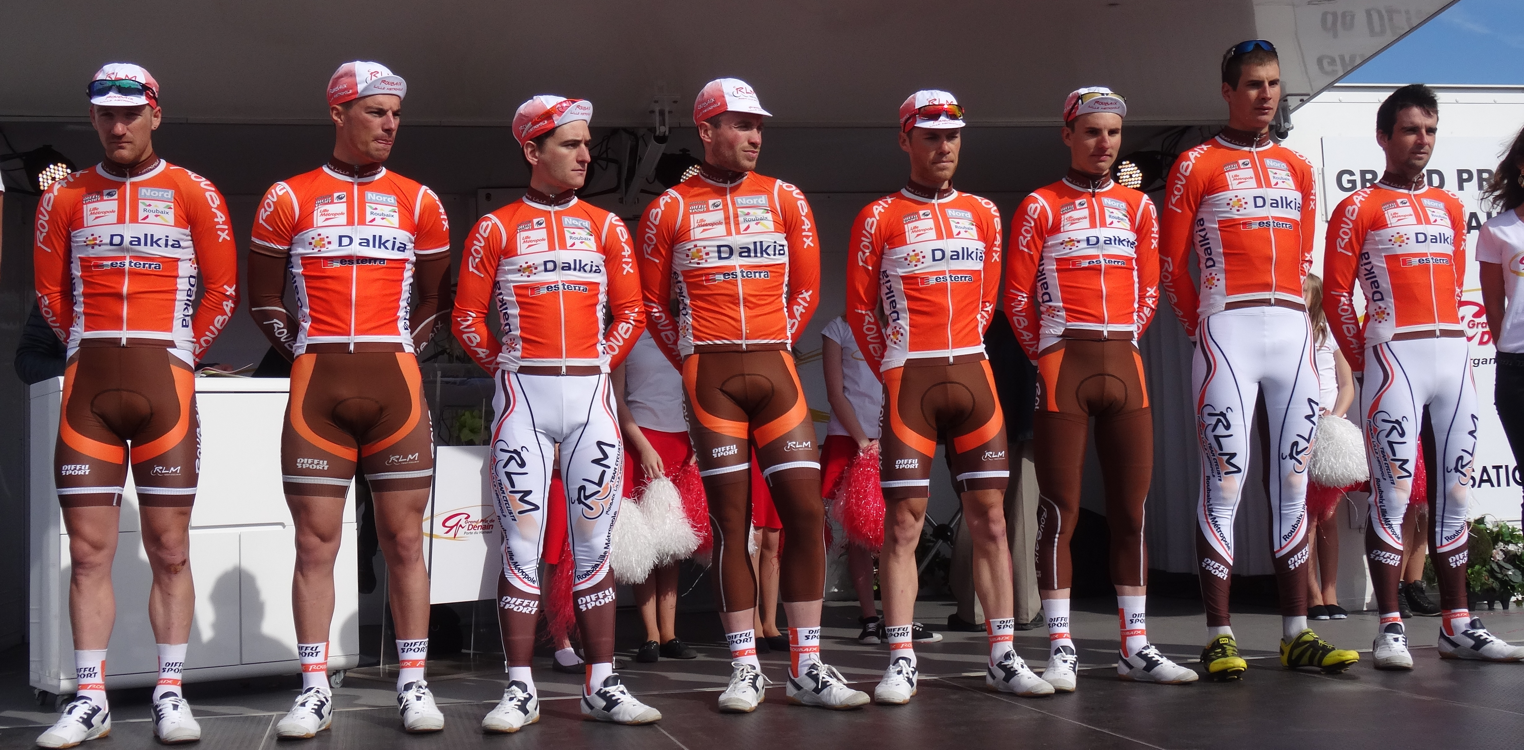 Reportage réalisé le jeudi 17 avril à l'occasion du départ et de l'arrivée du Grand Prix de Denain 2014 à Denain, Nord, Nord-Pas-de-Calais, France.